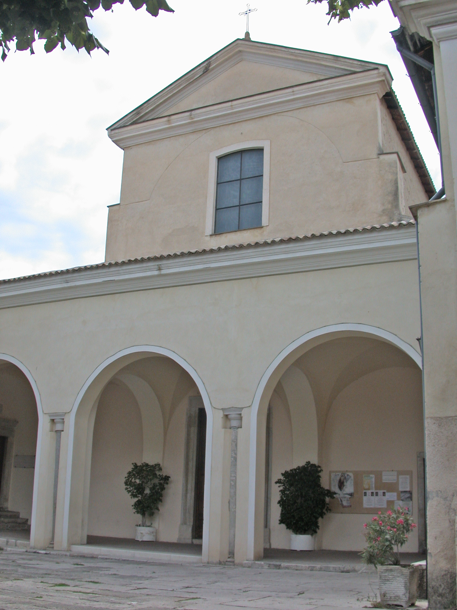 Formia (provincia di Latina, Lazio, Italia), chiesa di Sant'Erasmo.